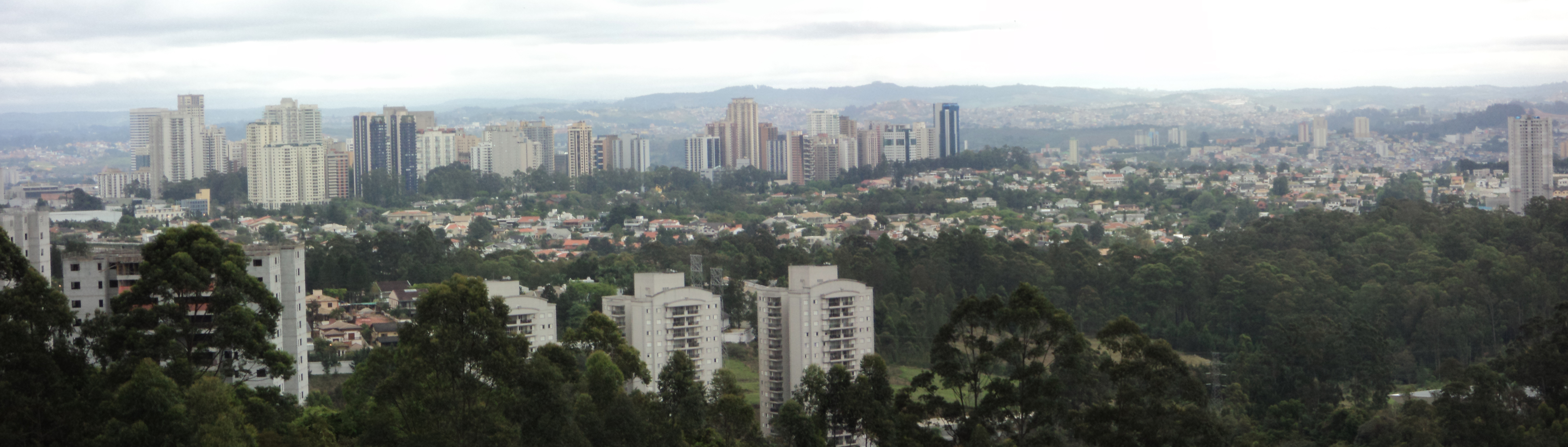 Foto panorâmica de Alphaville, na região metropolitana de São Paulo.